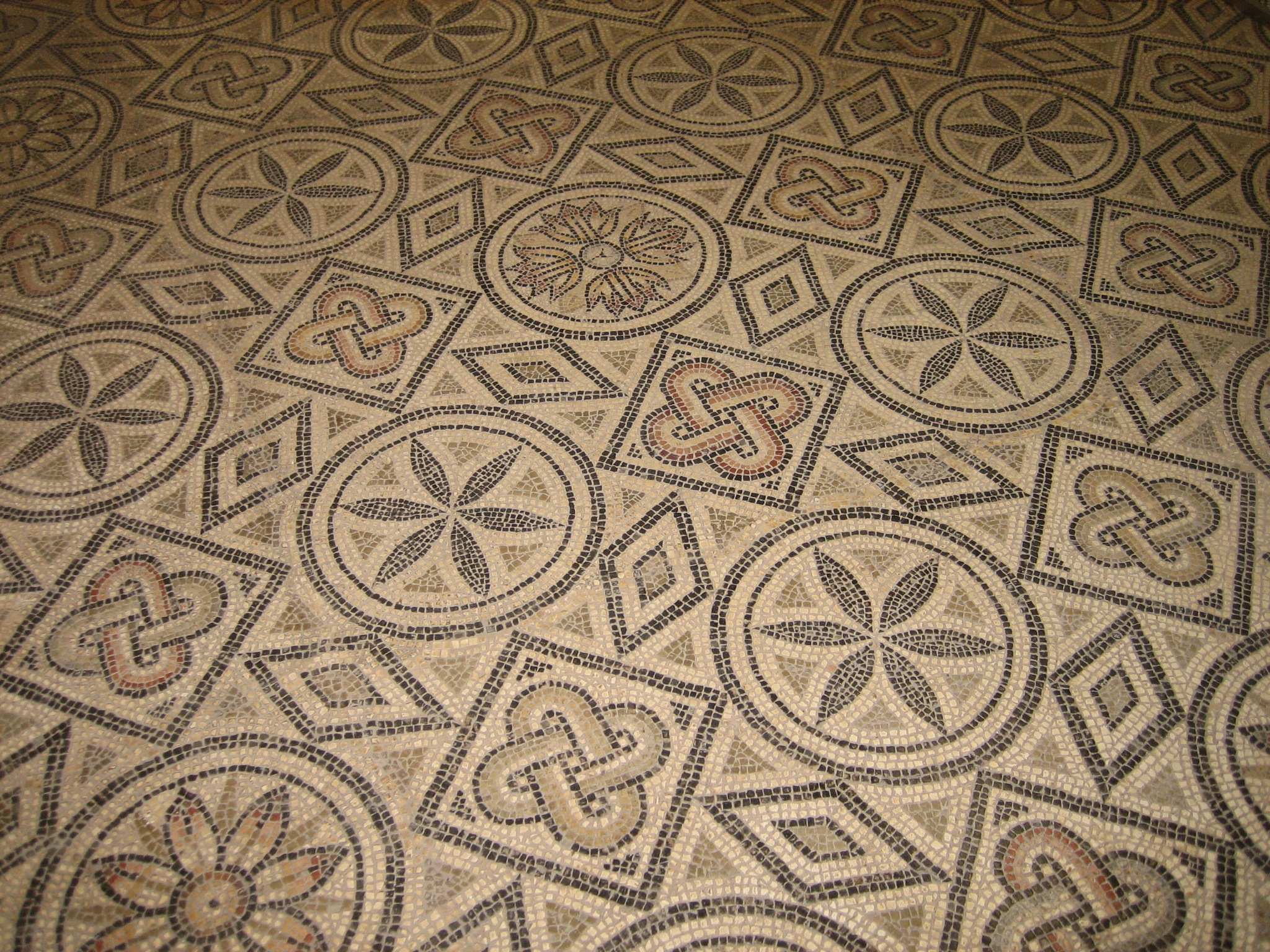 Mosaik an der Villa Otrang, bei Bitburg.